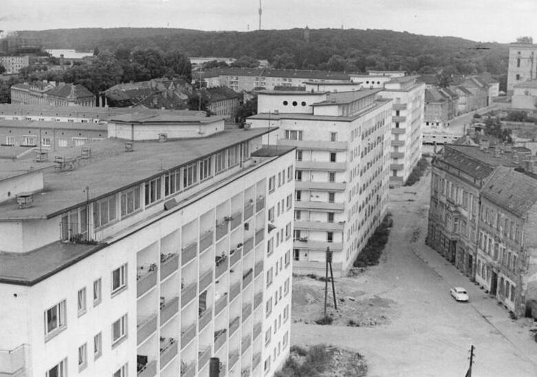 Zentralbild tre. 27.7.1964 Unser Foto zeigt Neubauten in der Albert-Klink-Straße in Potsdam-Havel.